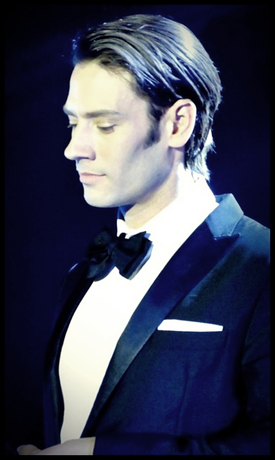 Urs de IL DIVO en concierto. 2014